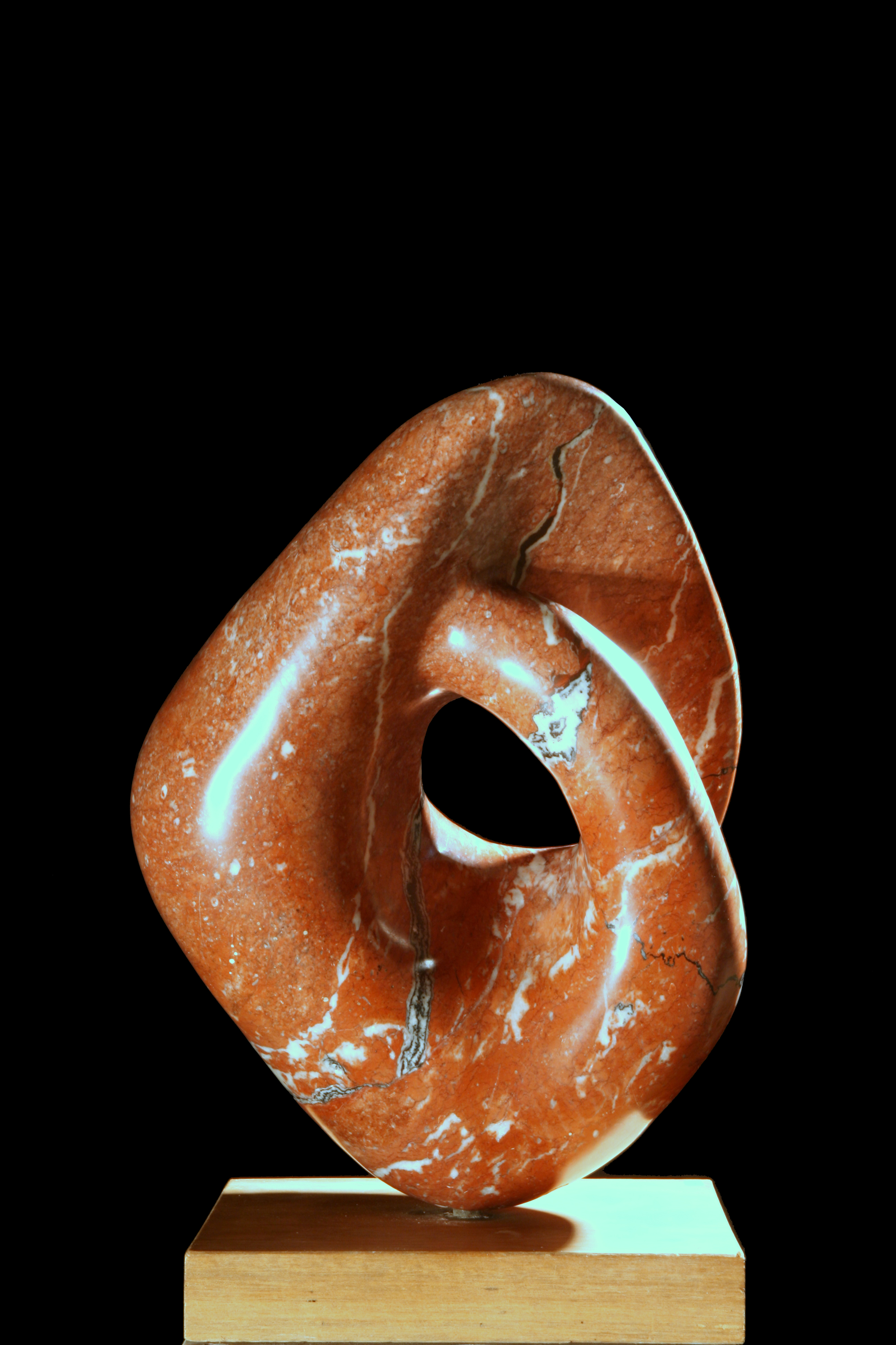 Marbre de Vérone. Sensualité